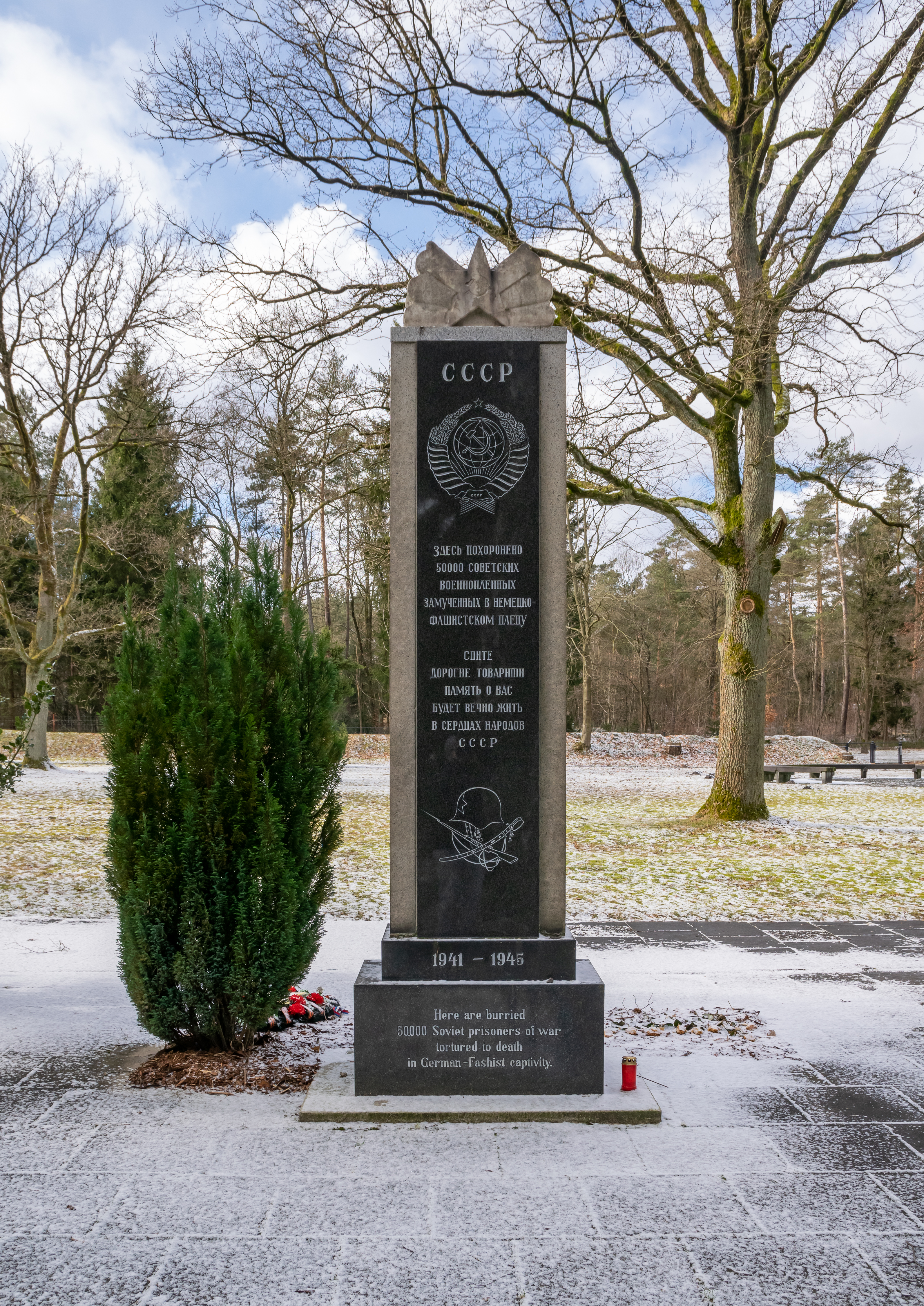 Sowjetischer Kriegsgefangenenfriedhof Bergen/Hörsten nahe der Gedenkstätte Bergen-Belsen auf dem Gelände des ehemaligen Konzentrationslagers